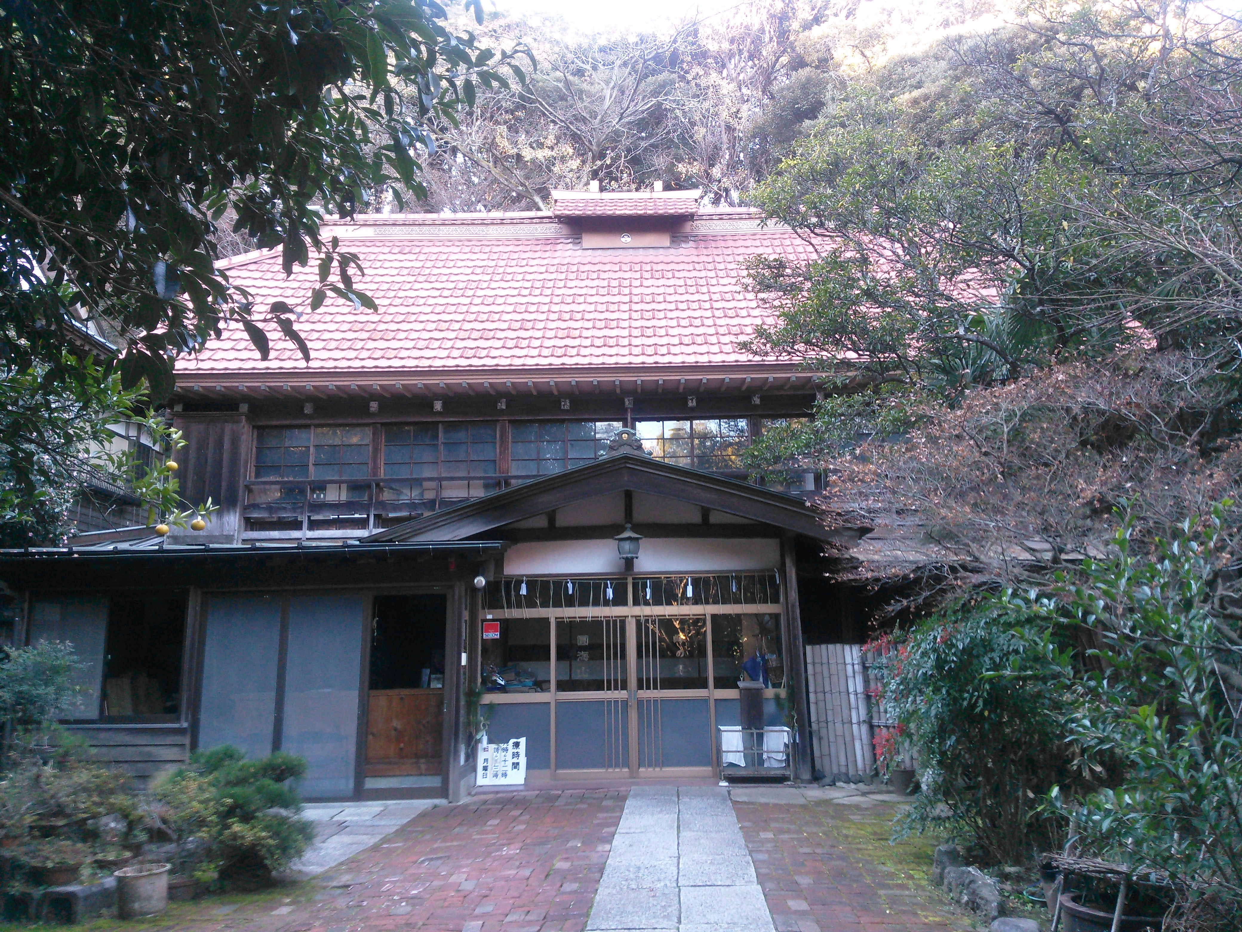 横浜市磯子区峰町、円海山護念寺の庫裏